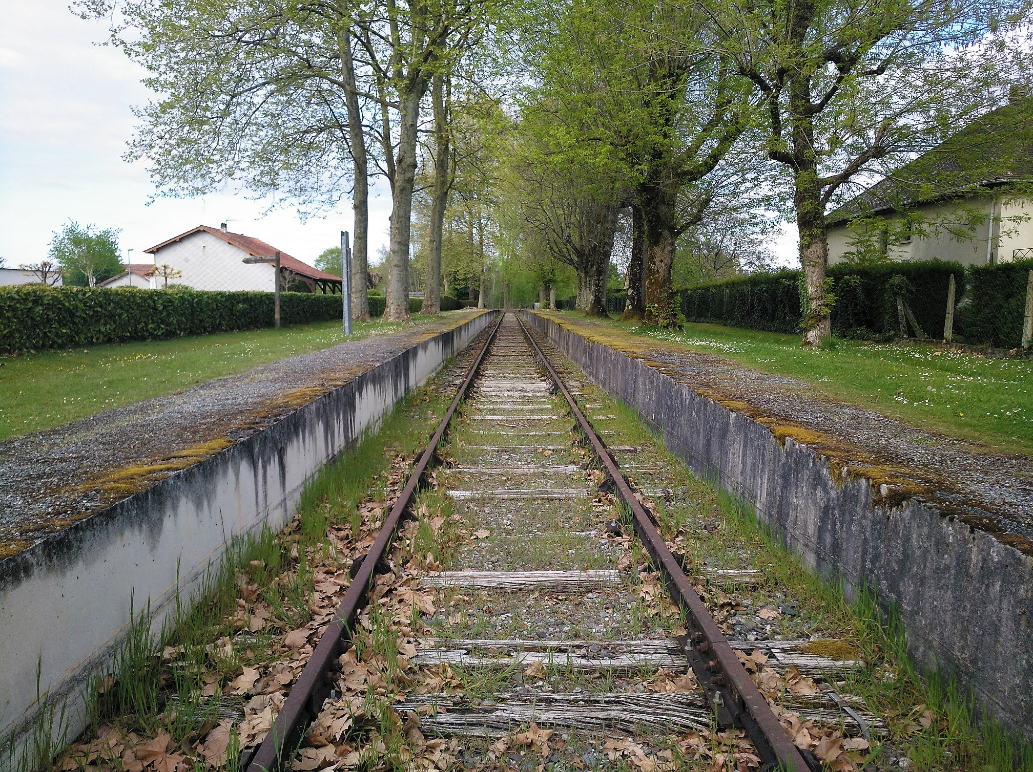 Burdinbide itxurako deportatuen omenezko egungo monumentua, Gurseko esparrua, Bearno